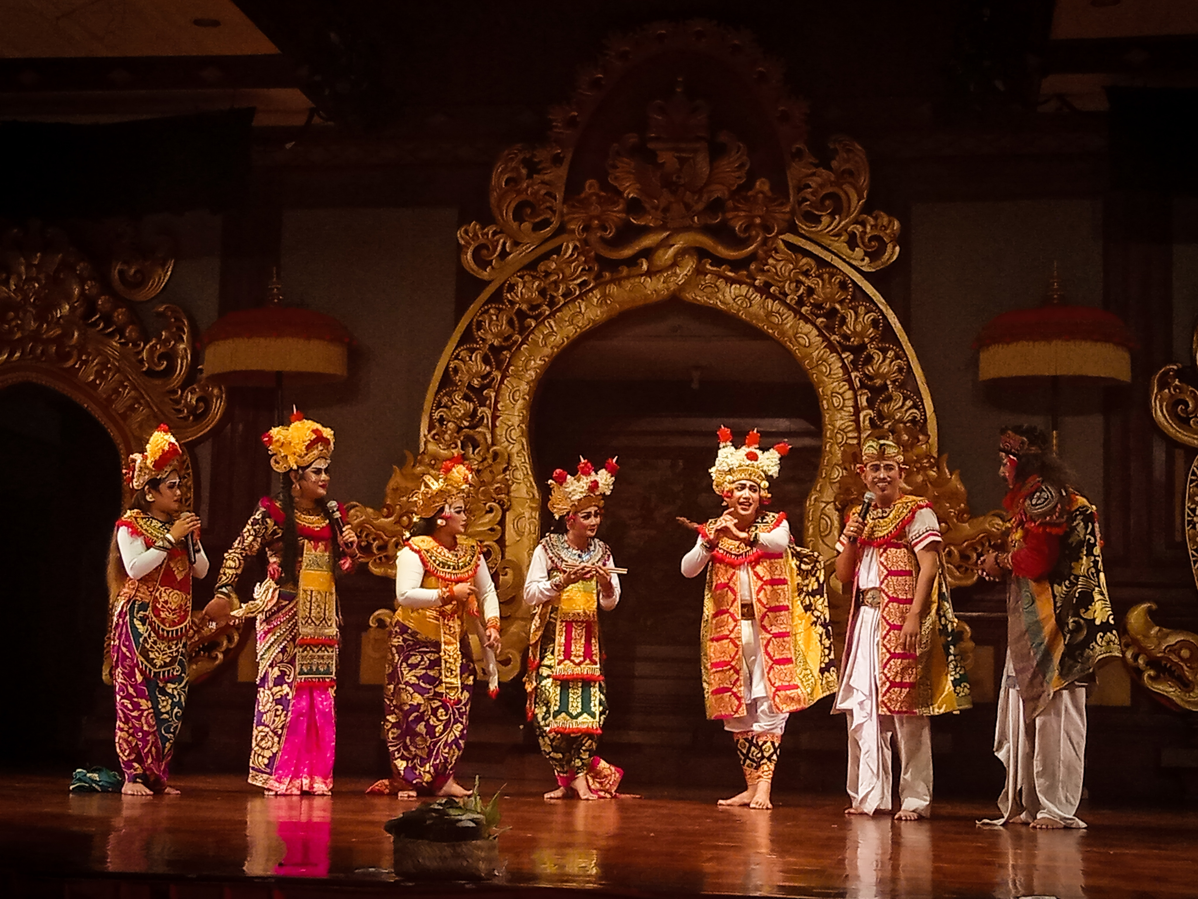 Bulan Bahasa Bali tahun 2020 yang diadakan pada bulan Februari. Pada bulan ini biasanya di meriahkan dengan beberapa pentas kesenian Bali contohnya Tari Arja. Tari Arja adalah sebuah dramatari yang dialognya di tembangkan secara macapat , dramatari ini pun di gemari oleh banyak kalangan masyarakat dan turis manca negara. Kata arja berasal dari Sansekerta yaitu Reja yang berarti "Keindahan" , jadi dramatari ini juga mementingkan aspek keindahan di dalam pementasannya.